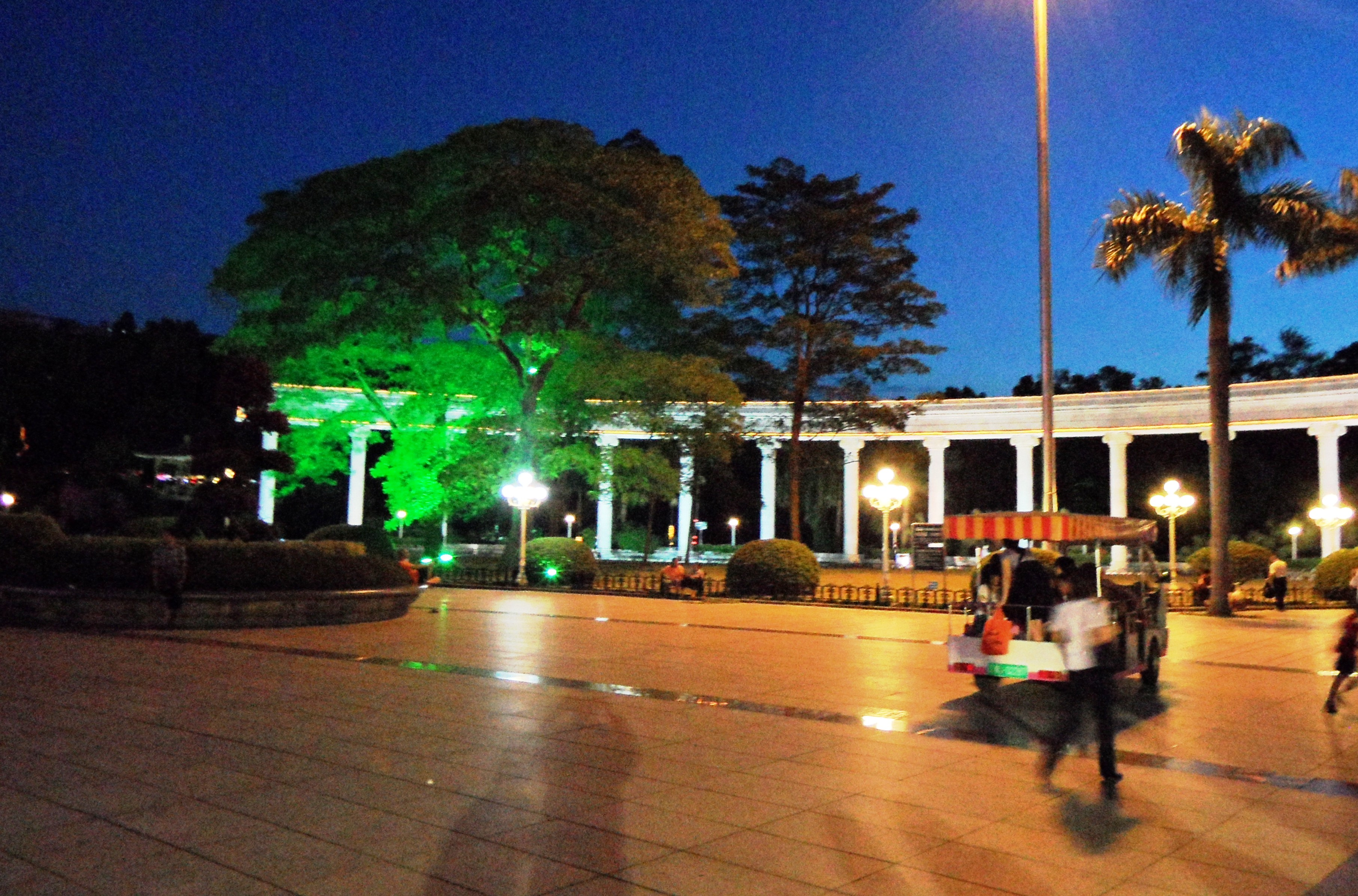 广东省江门市街道夜景